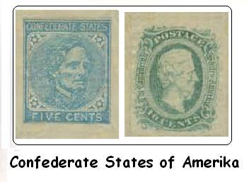 Die ersten zwei Postwertzeichen der Konföderiten Staaten von Amerika (CSA)